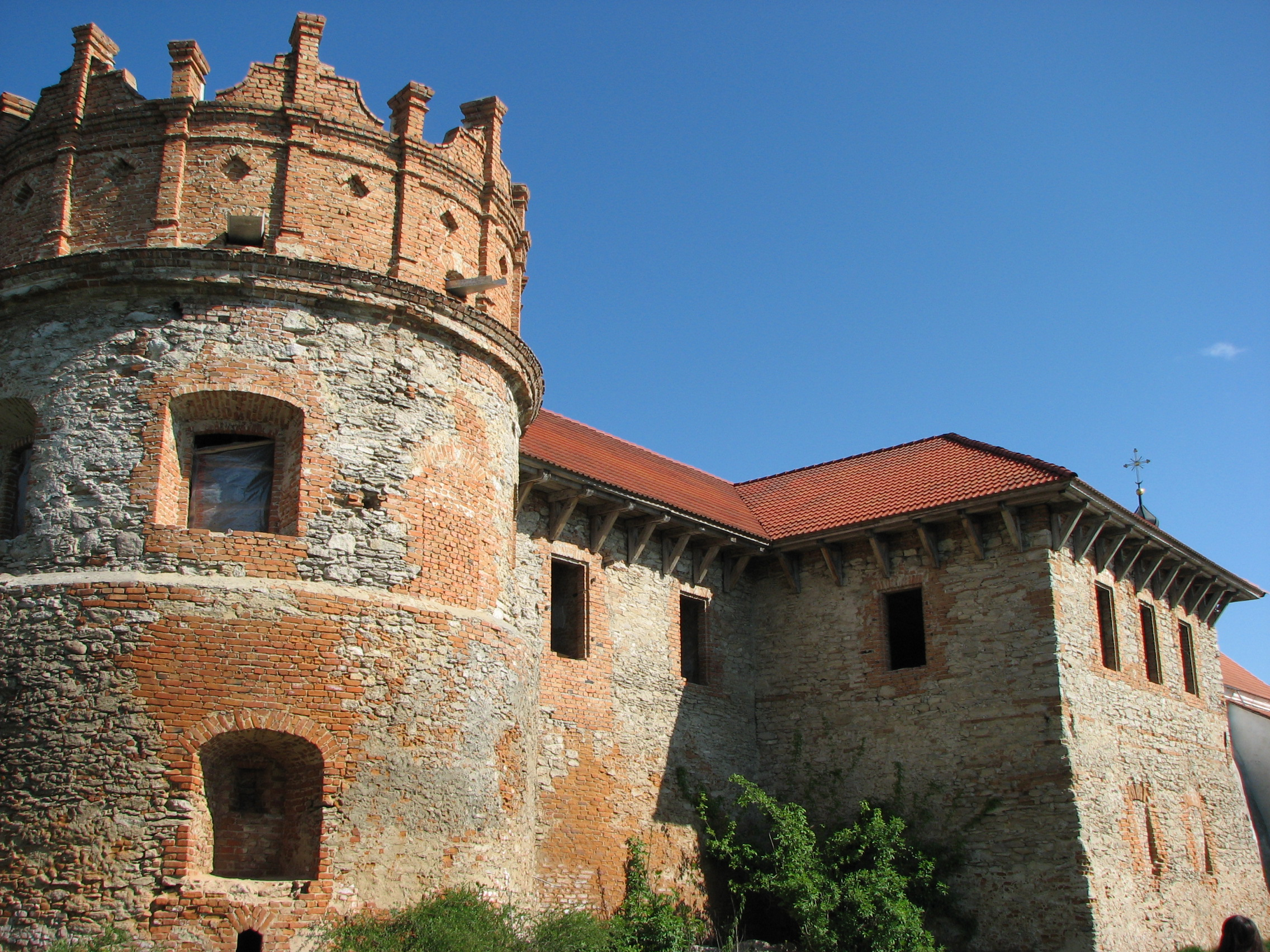 Старокостянтинів. Замок Острозьких.